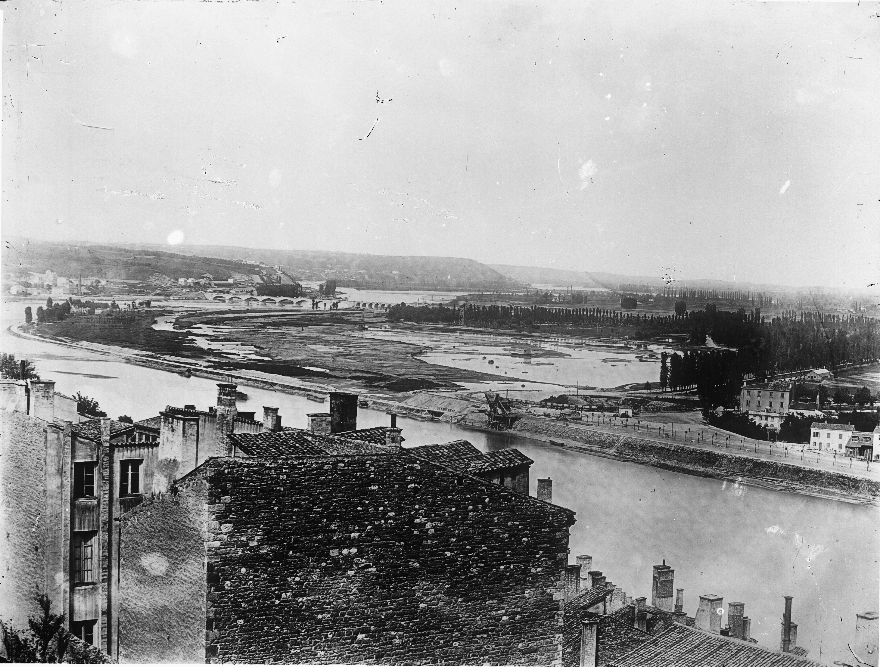 Création du parc de la Tête-d'Or - vue générale sur le site, avant le commencement des travaux